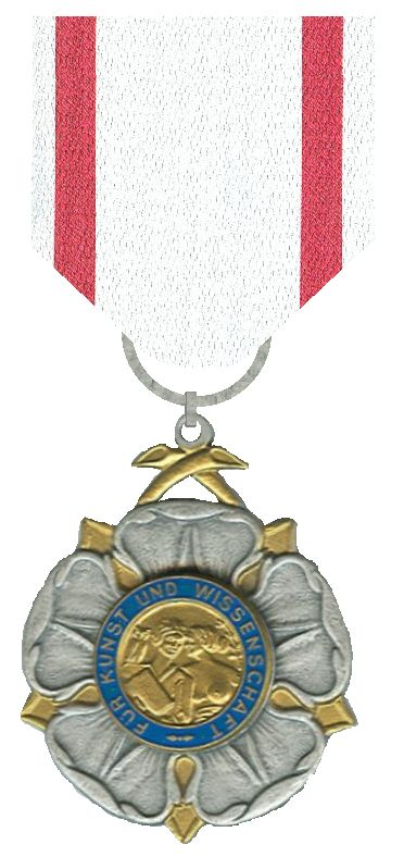 Scan van kleinood in mijn eigen verzameling. Robert Prummel 2007 Order of Merit for Art and Science, Lippe